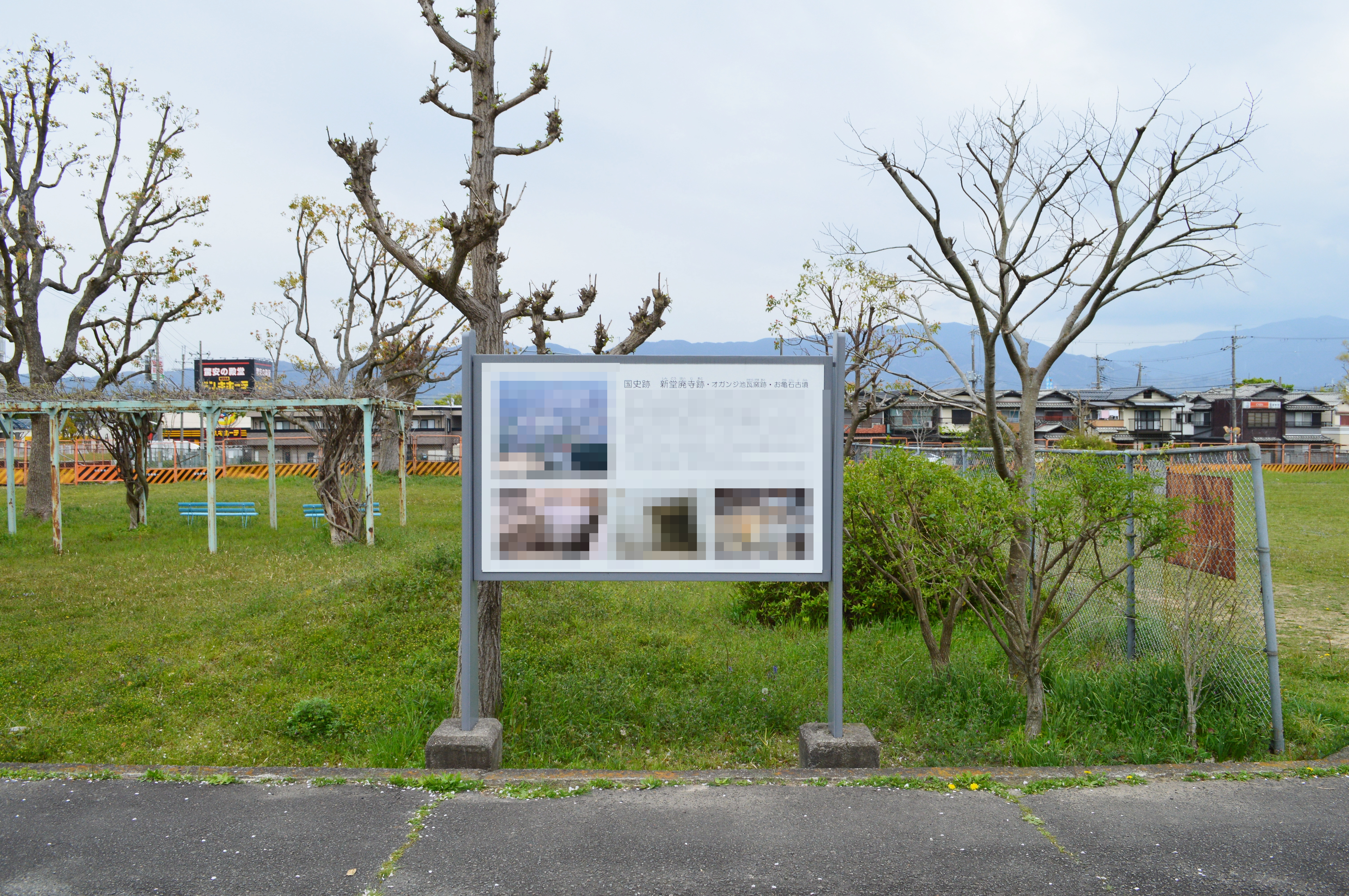 新堂廃寺跡 説明板 Nikon D3200